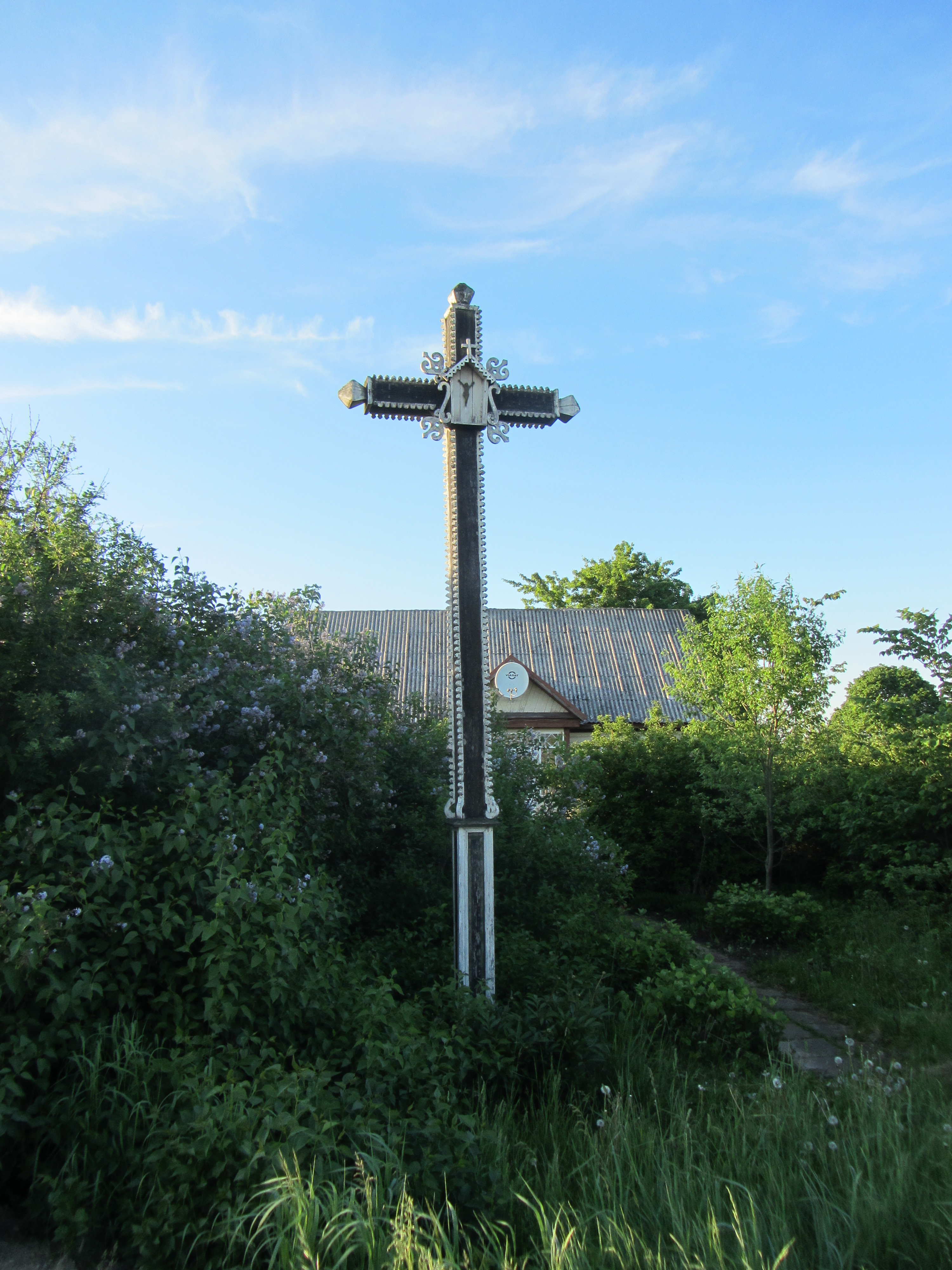 Kijėliai, Lithuania